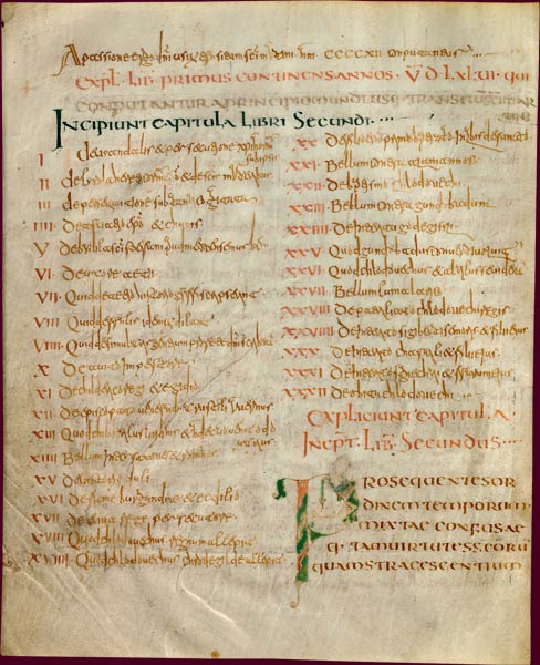 Grégoire de Tours, Histoire des Francs, livres 1 à 6. Initiale P en forme de poisson ouvrant le livre consacré à Clovis. Luxeuil ou Corbie, fin du VIIe siècle. BnF, Manuscrits, Latin 17655 fol.13v-14. Transcrit dans une écriture cursive difficile à lire, ce célèbre ouvrage relatant l'histoire mérovingienne est orné d'initiales dont les motifs géométriques ou zoomorphes cloisonnés et rehaussés de couleurs vives illustrent bien le vocabulaire décoratif pratiqué en Gaule au VIIe siècle. Pratiqué sur le continent durant les VIIe et VIIIe siècles, en particulier à Bobbio, Luxeuil et Corbie, le style mérovingien se caractérise par ses initiales multicolores, inspirées des émaux cloisonnés qui ornaient les bijoux. Les initiales, comme ici, sont souvent composées de poissons et d'oiseaux stylisés, dont les formes arrondies s'adaptent à la structure de la lettre : le début du second livre, consacré à Clovis, est ainsi orné d'un P à la boucle en forme de poisson. Ces initiales rouges, jaunes et vertes sont typiques d'un décor que le scriptorium de Luxeuil contribue à diffuser ; elles sont dues aux copistes, habituellement auteurs à cette époque à la fois de l'écriture et de la décoration.